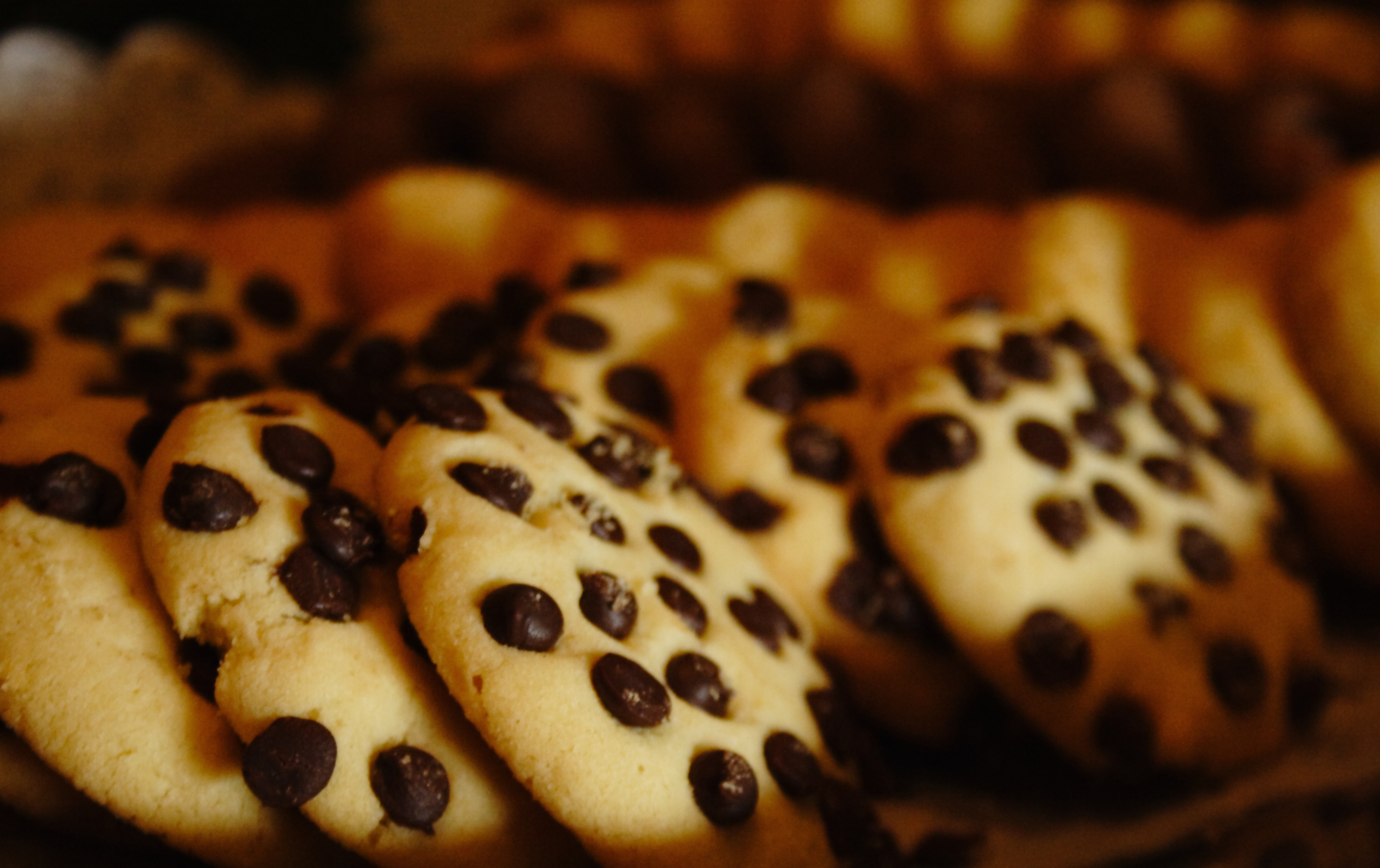 Galletas que se encontraban en el comedor durante Wikimanía 2015.